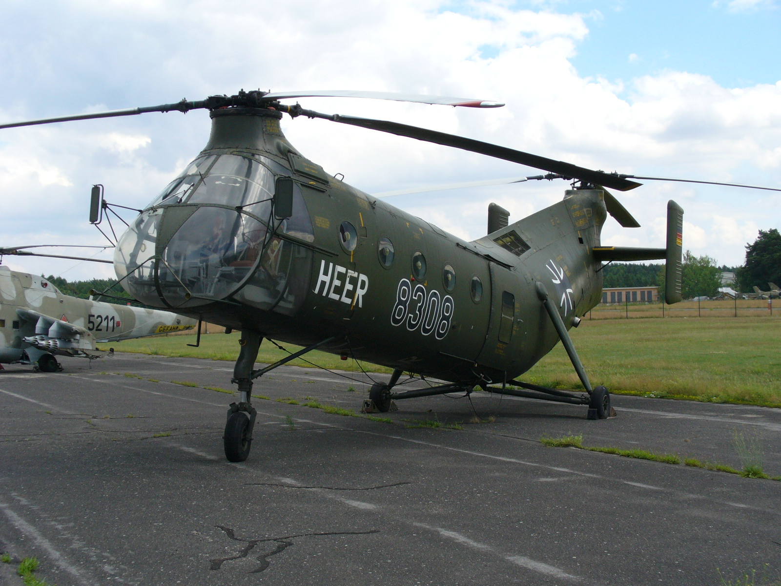 Helikopter transportowy Vertol H-21 C niemieckich wojsk lądowych German Army's Vertol H-21 C transport helicopter